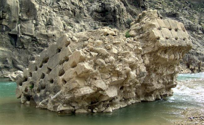 پل مهرنرسه در فیروزآباد فارس